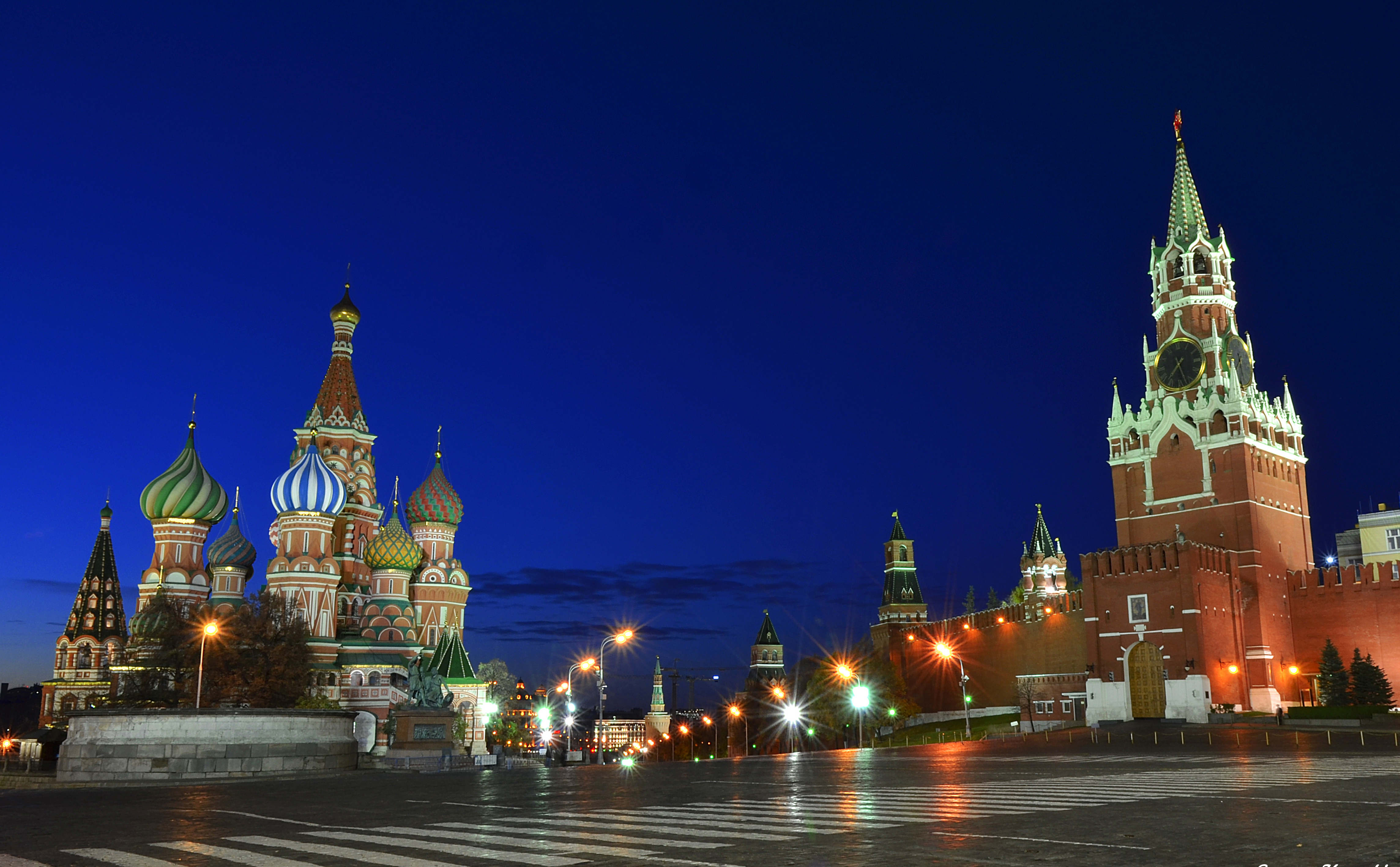 Можно увидеть здесь